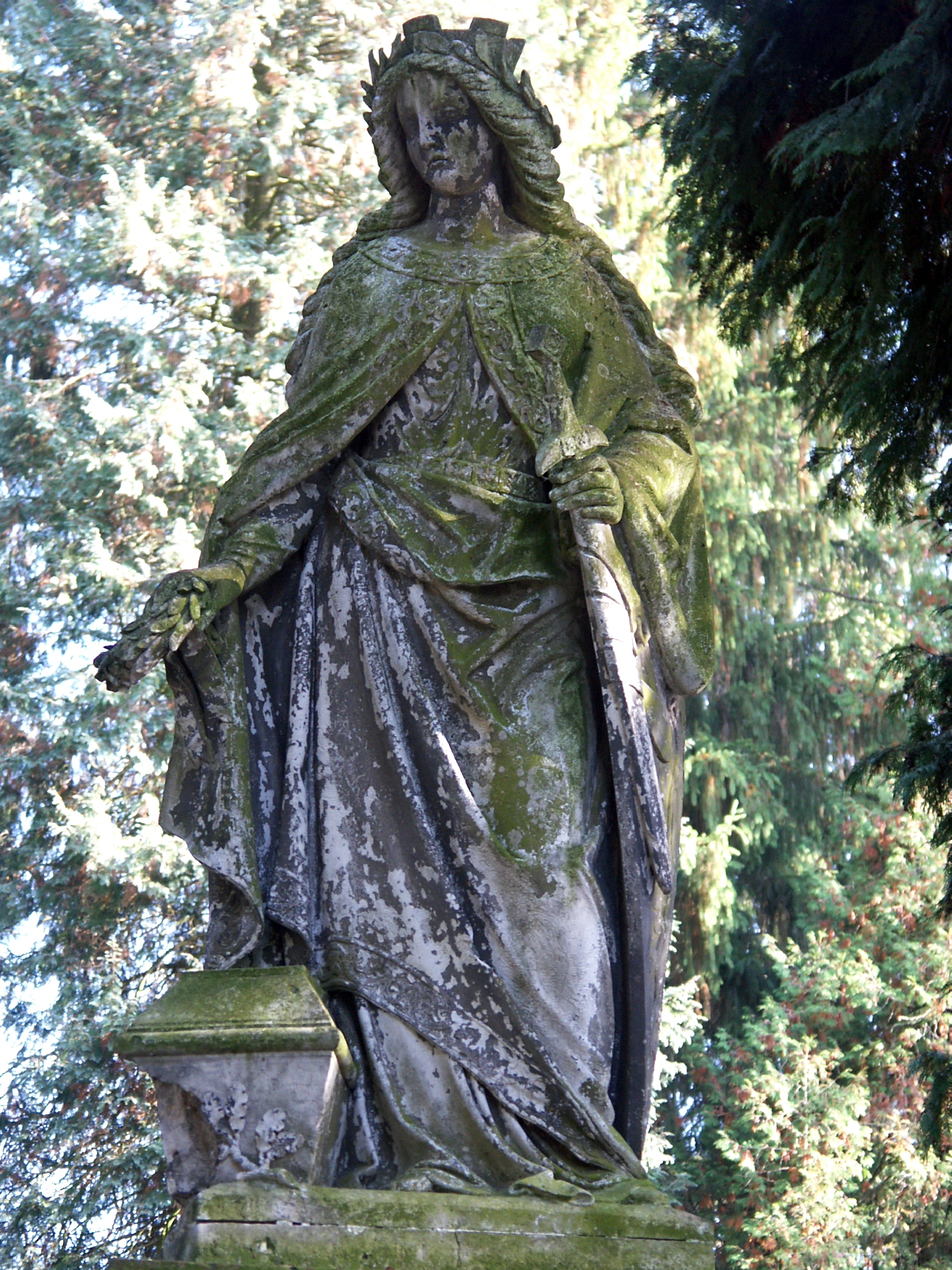 War Memorial - Krieger-/Kriegsopferdenkmal - Mémorial de guerre